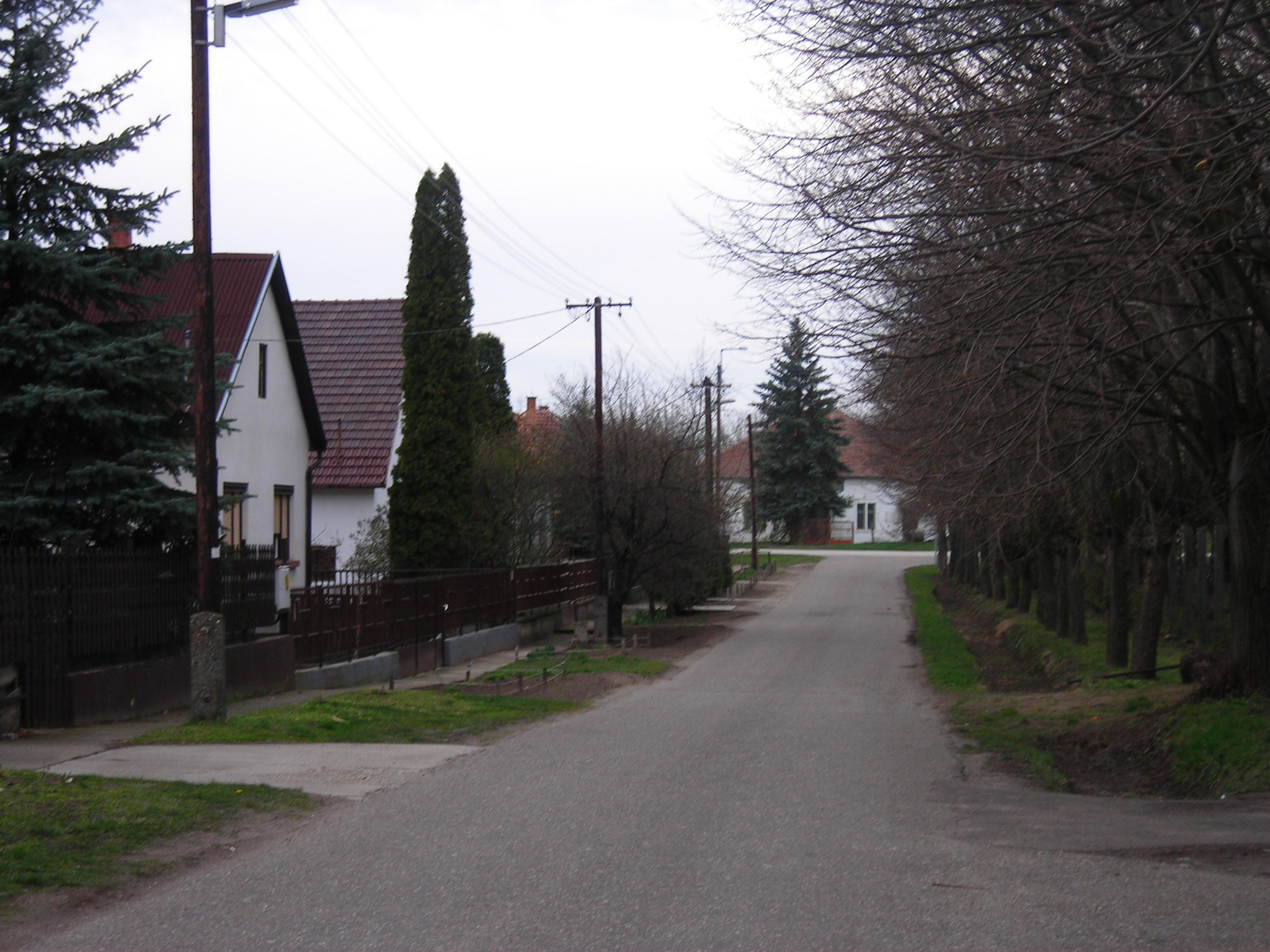 Fülöpjakabi utca